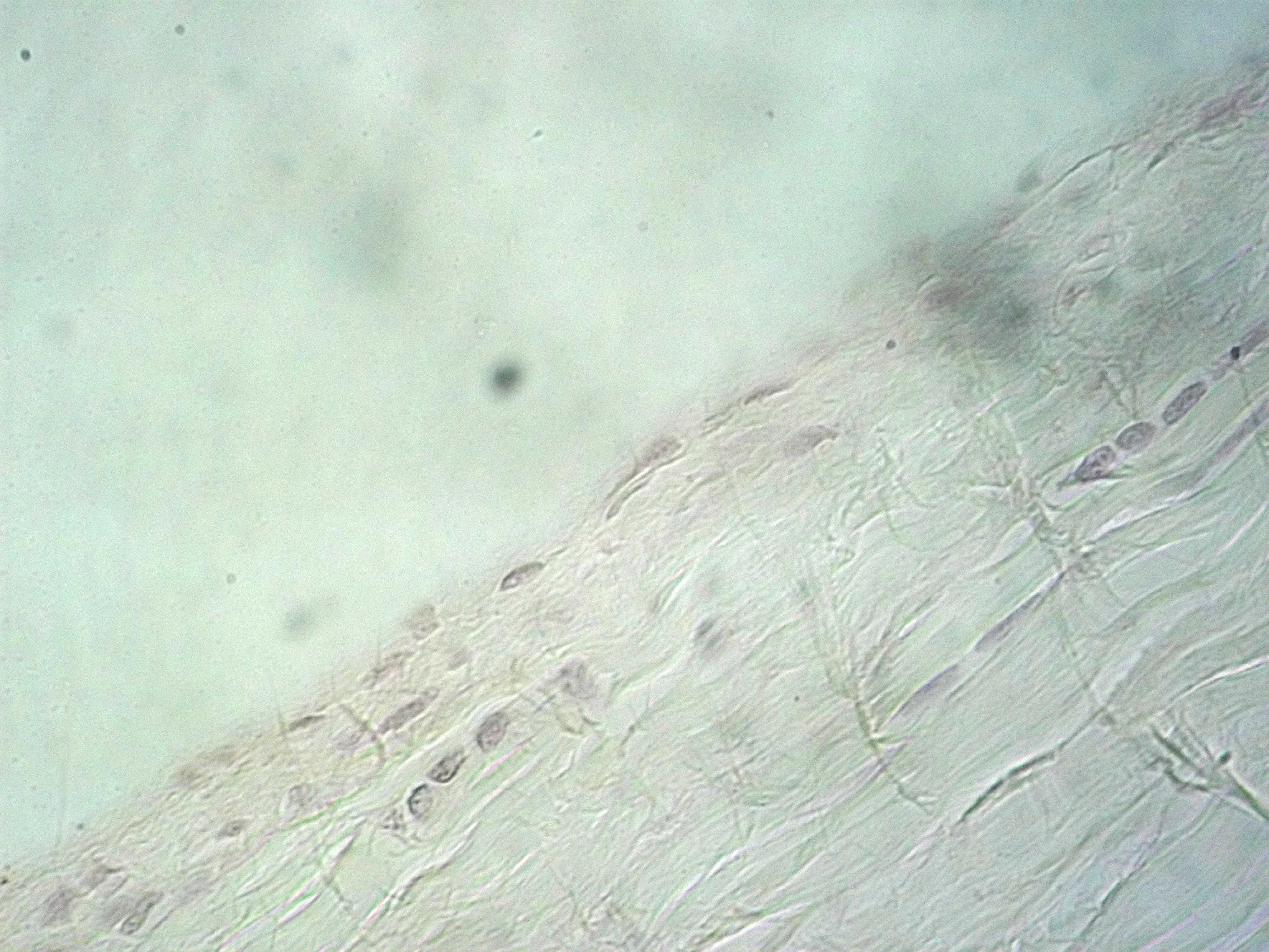 Fotografía de un preparado de tendón al microscopio óptico; 400X; tinción con hematoxilina-eosina. Las manchas negras son un artefacto de las lentes. Sobre el borde pueden verse fibroblastos alineados entre las fibras colágenas.